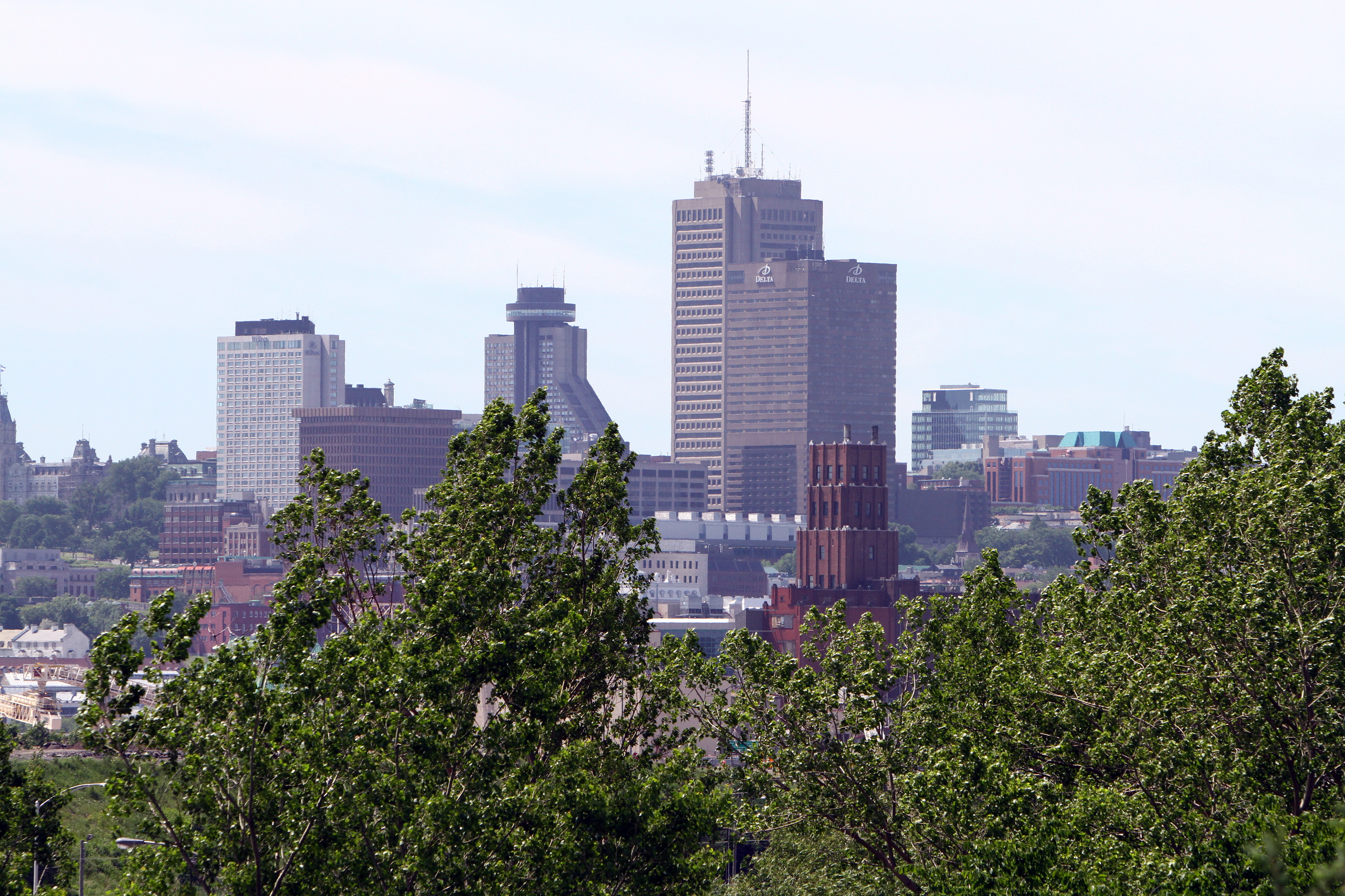 Québec vue de la tour d'observation